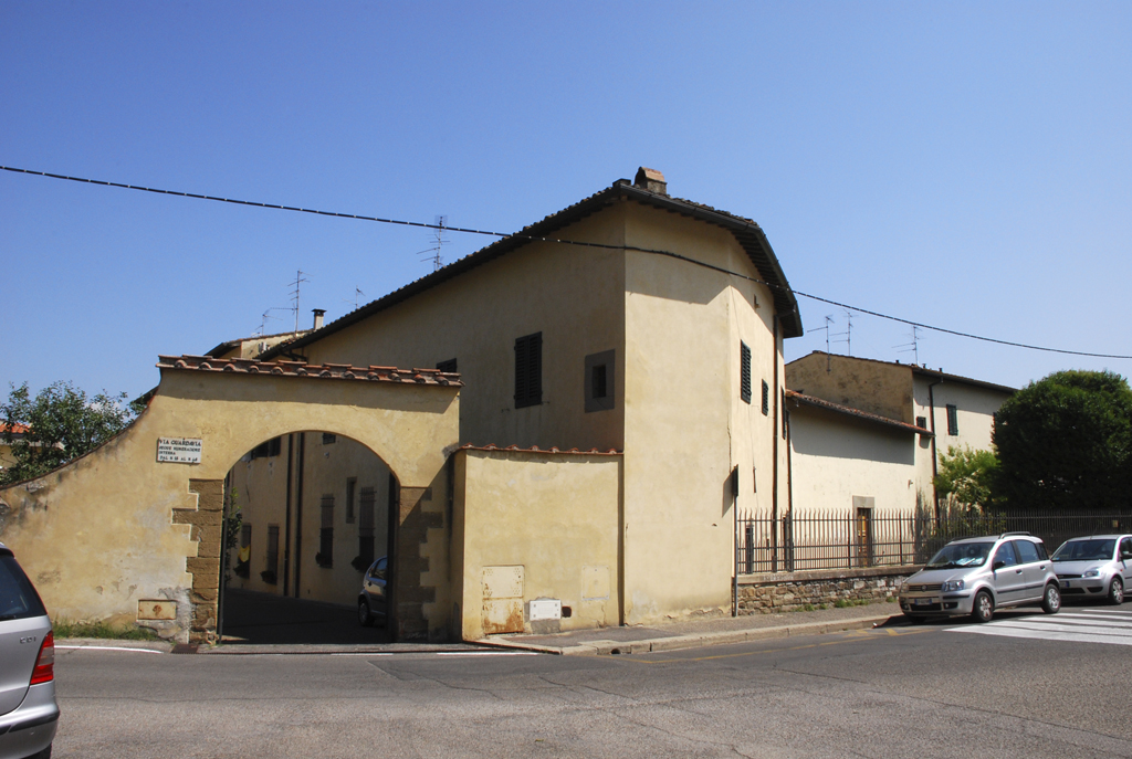 Villa Carducci di Legnaia or Villa Carducci-Pandolfini, Florence, Italy - contains "Il ciclo degli uomini e donne illustri" (around 1455), frescos by Andrea del Castagno).